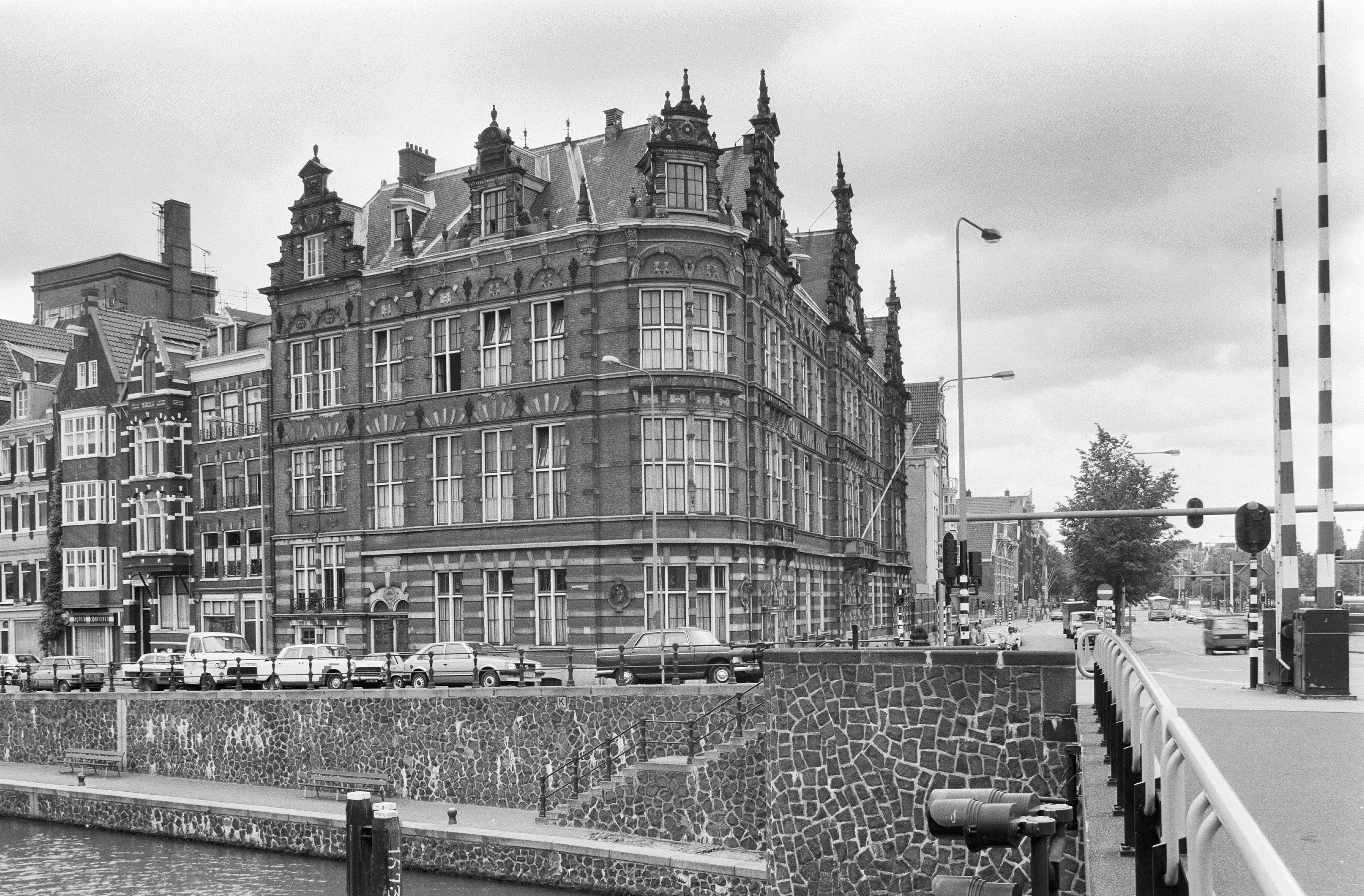 Kweekschool voor de Zeevaart: overzicht W.en J.L. Springer